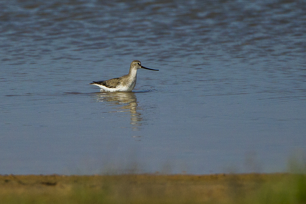 Terek Sandpiper - Kazakistan_S4E0037